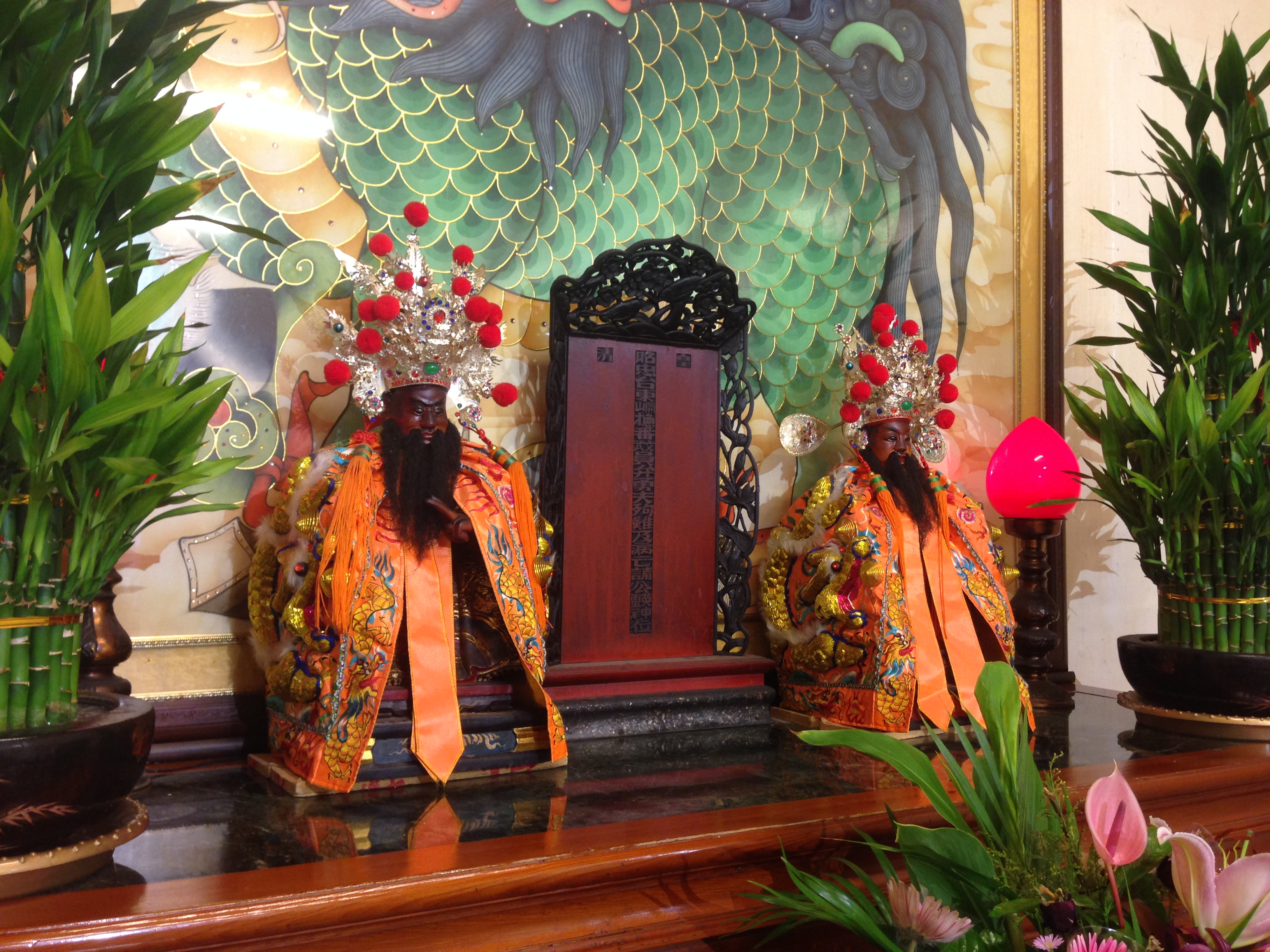 中文（台灣）: 台東天后宮昭忠祠神像